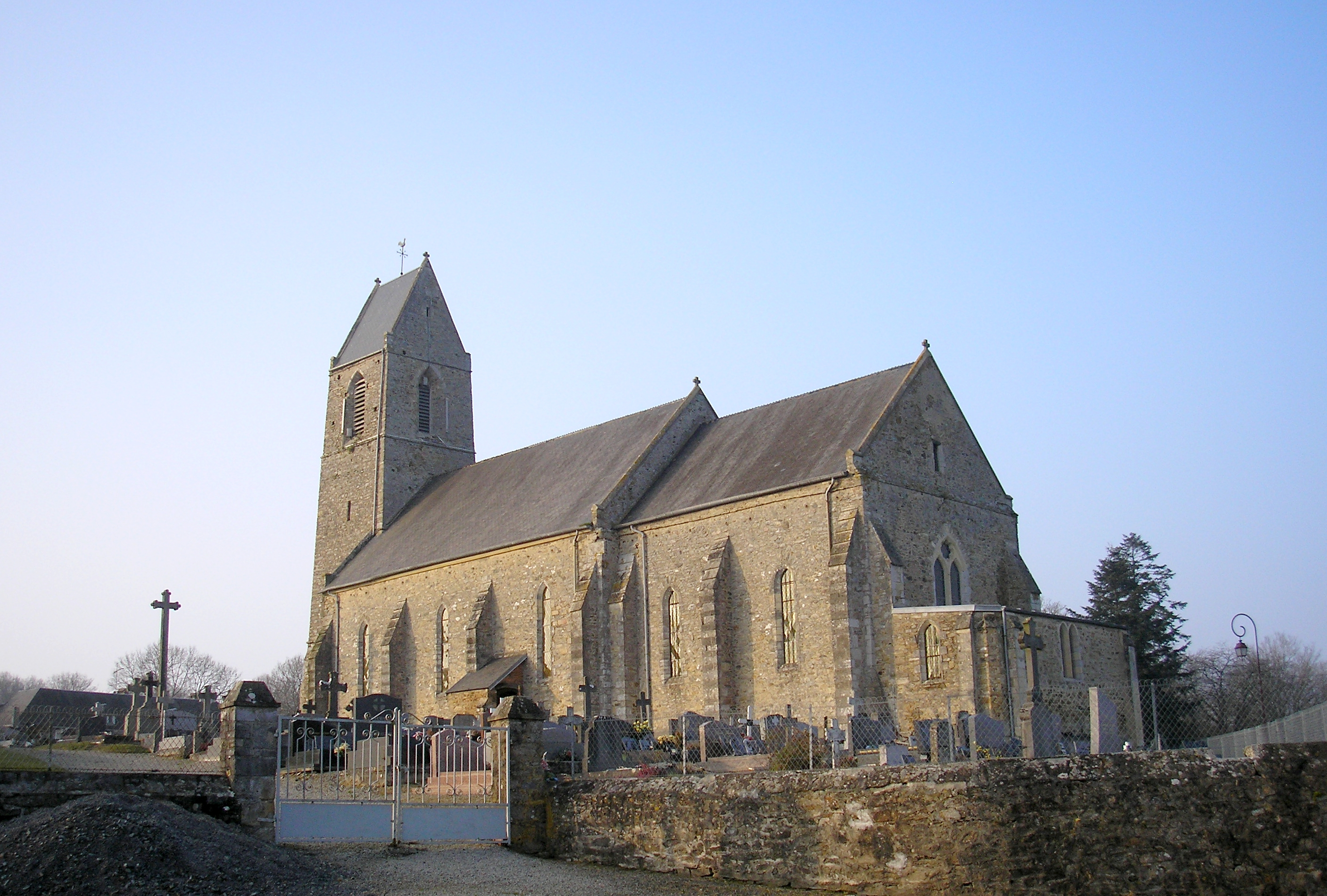 Lozon (Normandie, France). L'église Saint-Lô.